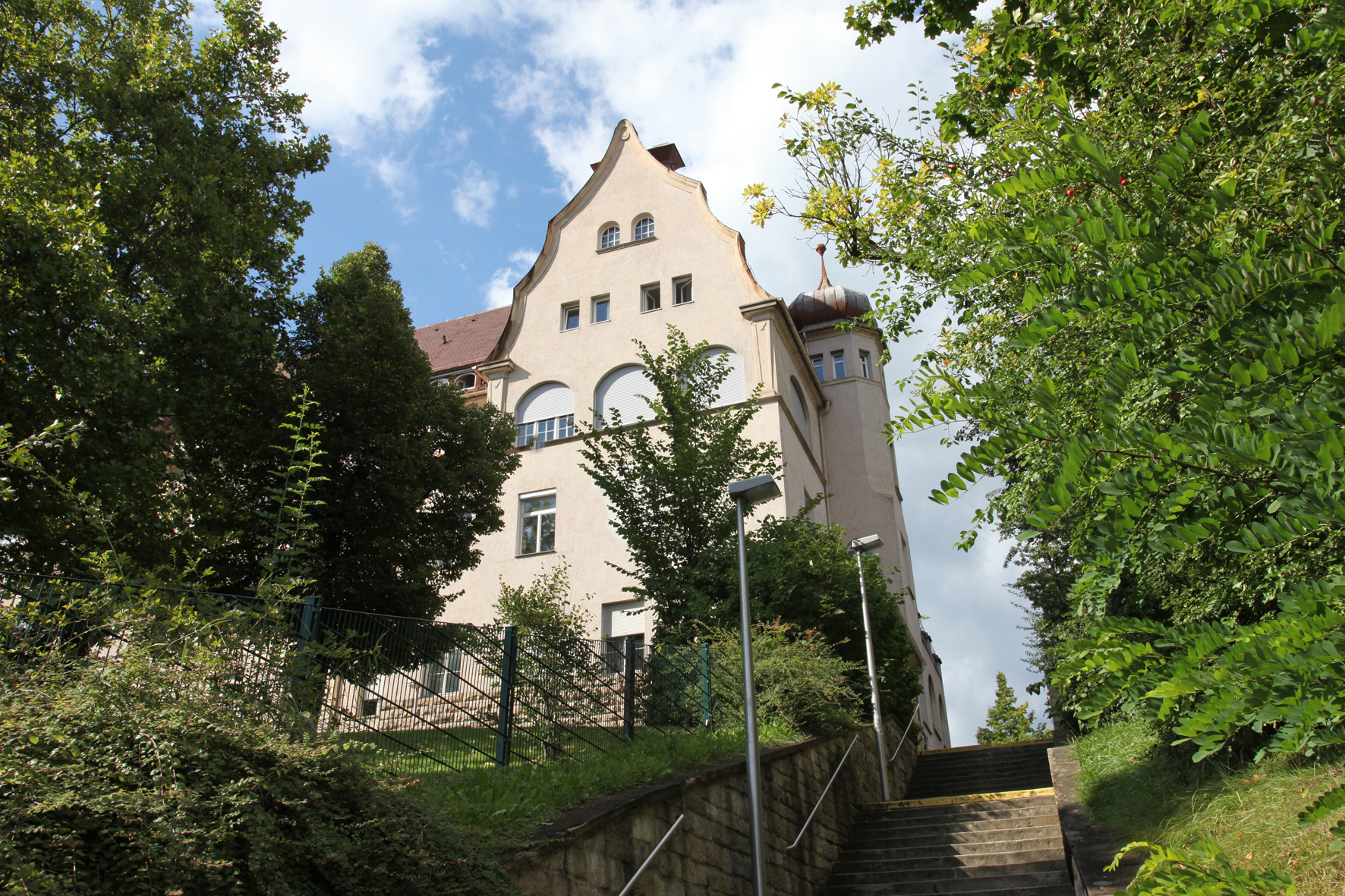 Universitäts-Augenklinik Tübingen